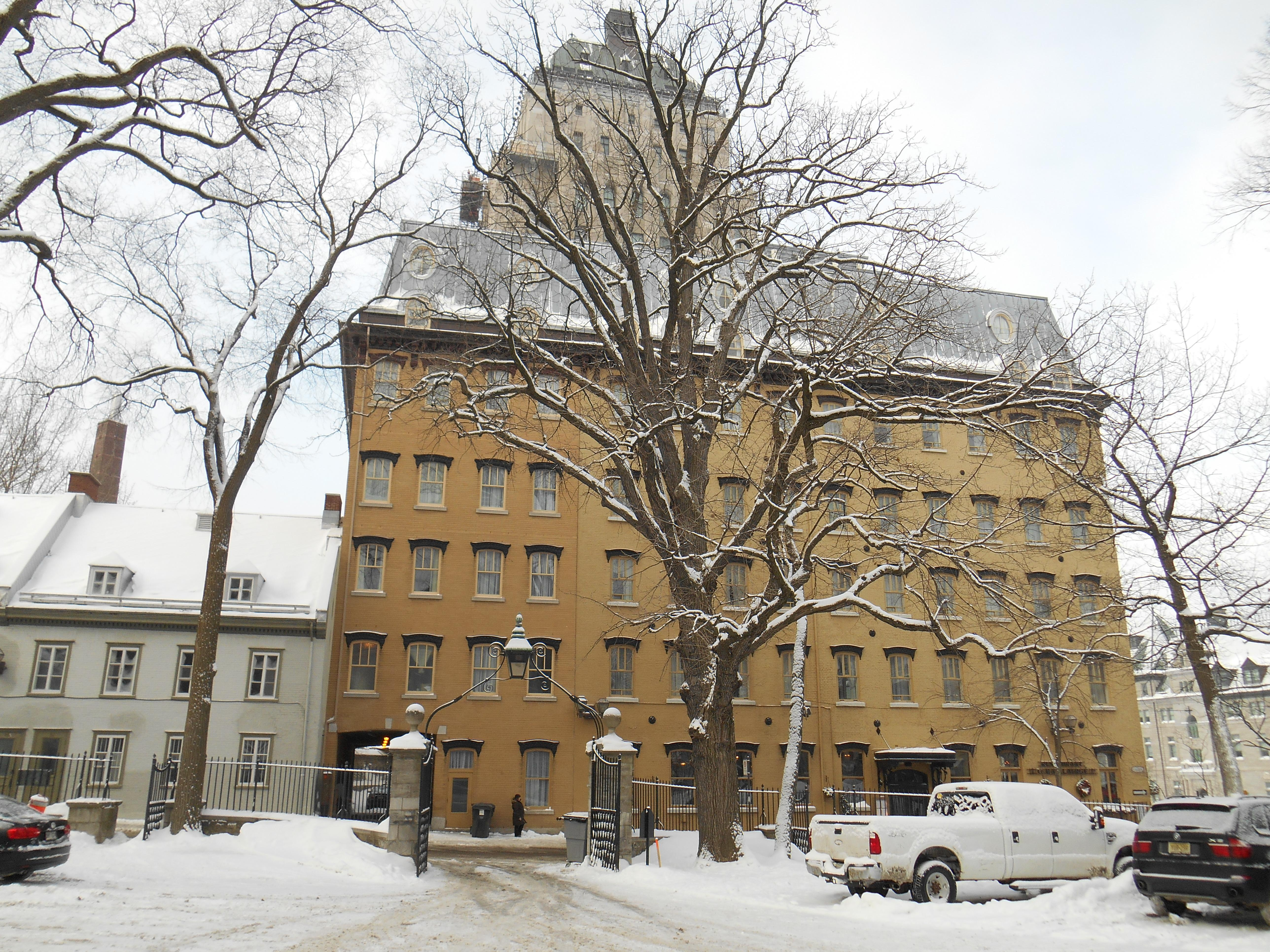 Clarendon House, 57, rue Sainte-Anne, Québec